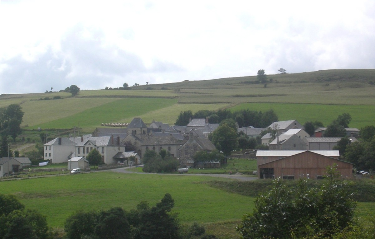 Le village de Molèdes (15) Cézallier